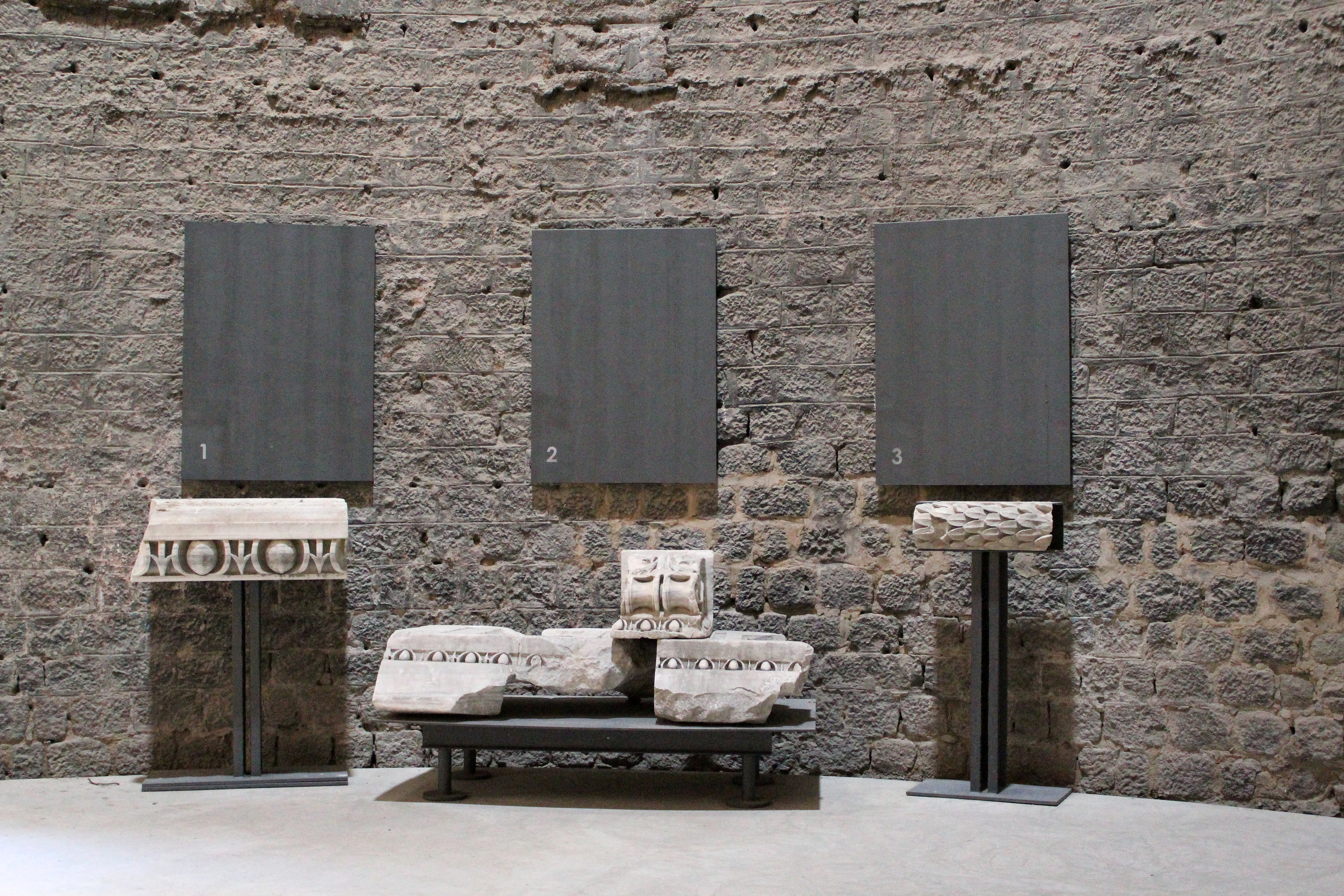 Pergamon, Westtürkei, Rote Halle Südturm innen nach Restaurierung